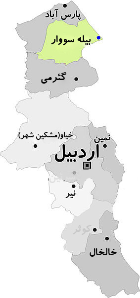 بیله سووار شهریستانی